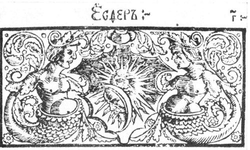 Біблія Скарыны. Застаўка да пражскага выдання “Юдзіф”.